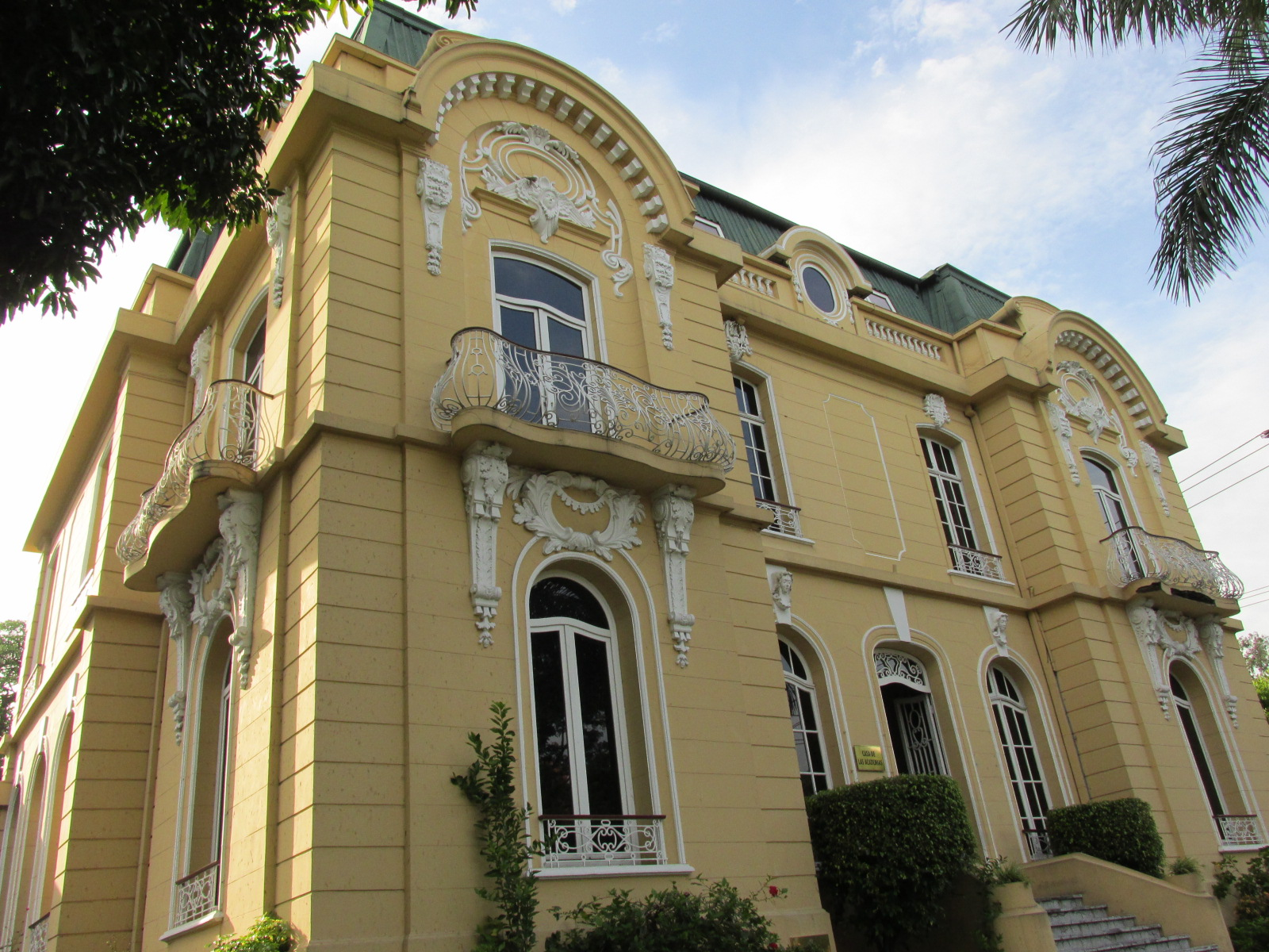 La Casa de las Academias es un edificio histórico de San Salvador construido en la década de 1920 y ha tenido algunos huéspedes ocasionales como los presidentes Richard Nixon y Lyndon Johnson